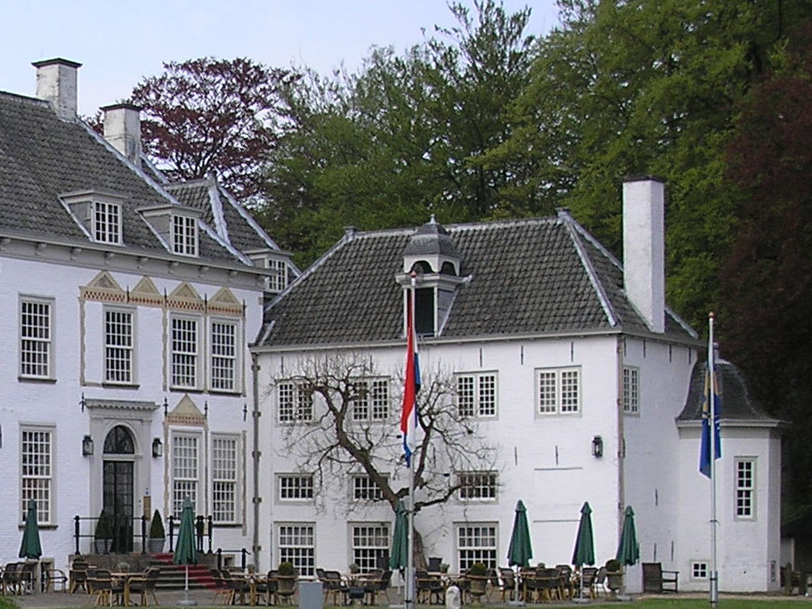 Huis 't Velde, Warnsveld (NL) Entree aan voorkant Foto: Pudding4brains, 5 mei 2006 - Publiek Domein